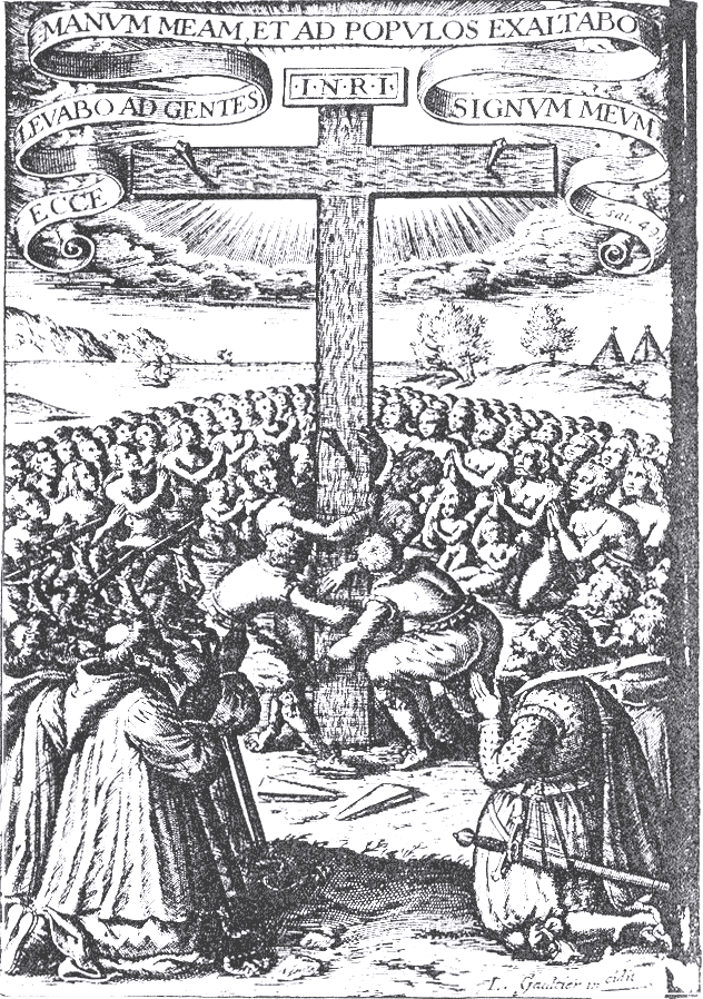 Ilustração da obra Histoire de la mission: Paris 1614. Levantamento da cruz na colônia francesa. Em vez de ler o requerimento como fizeram os espanhóis, os franceses preferiam apresentar a aliança entre índios e franceses como uma livre submissão da parte dos índios. São eles que, com a ajuda dos franceses, erigem a cruz, todos os outros índios e franceses rezam. Uma inscrição latina faz alusão à missão ("Ecce levabo ad gentes manum meam, et ad populos exaltabo signum meum", Isai[a] 49" ("Eis que levantarei a minha mão para as nações e arvorarei o meu estandarte para alertar os Povos", Biblia, 1982 Isaías, cap.49, verso 22). A gravura é assinada por L. Gauthier.